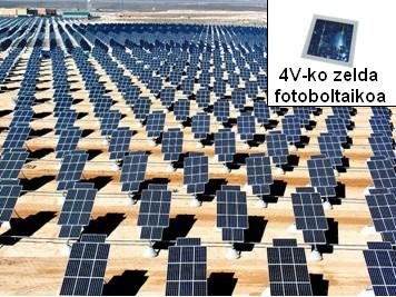 Panel fotoboltaikoak